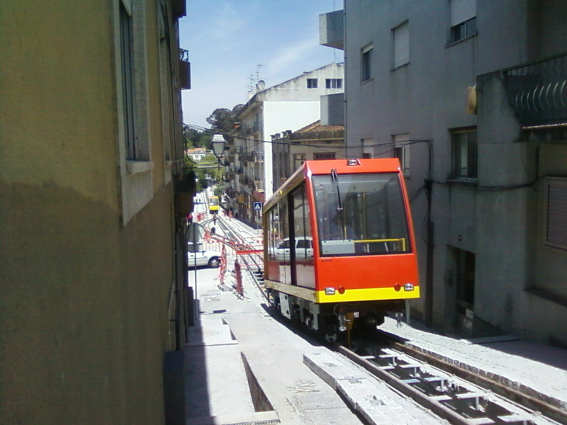 Funicular de Viseu, fase de finalização da construção; cabina vermelha.